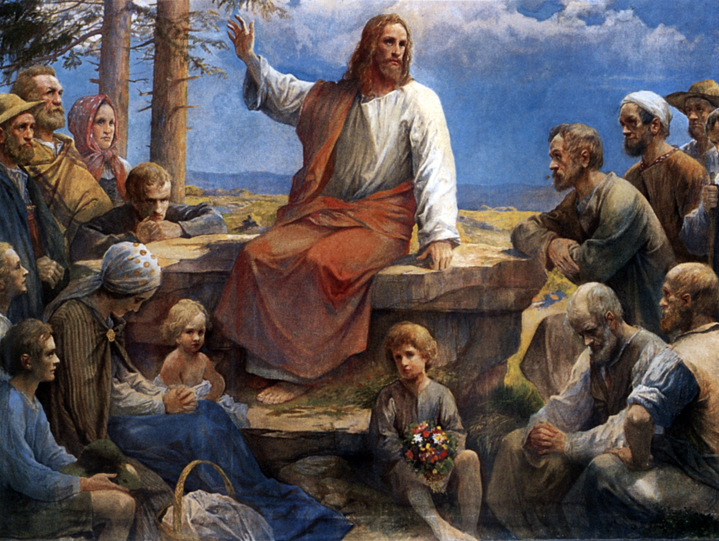 Bergpredigt im Schwarzwald, Gemälde für die evang. Kirche in Reinerzau im Schwarzwald, um 1912, von Rudolf Yelin d.Ä. (1864-1940)